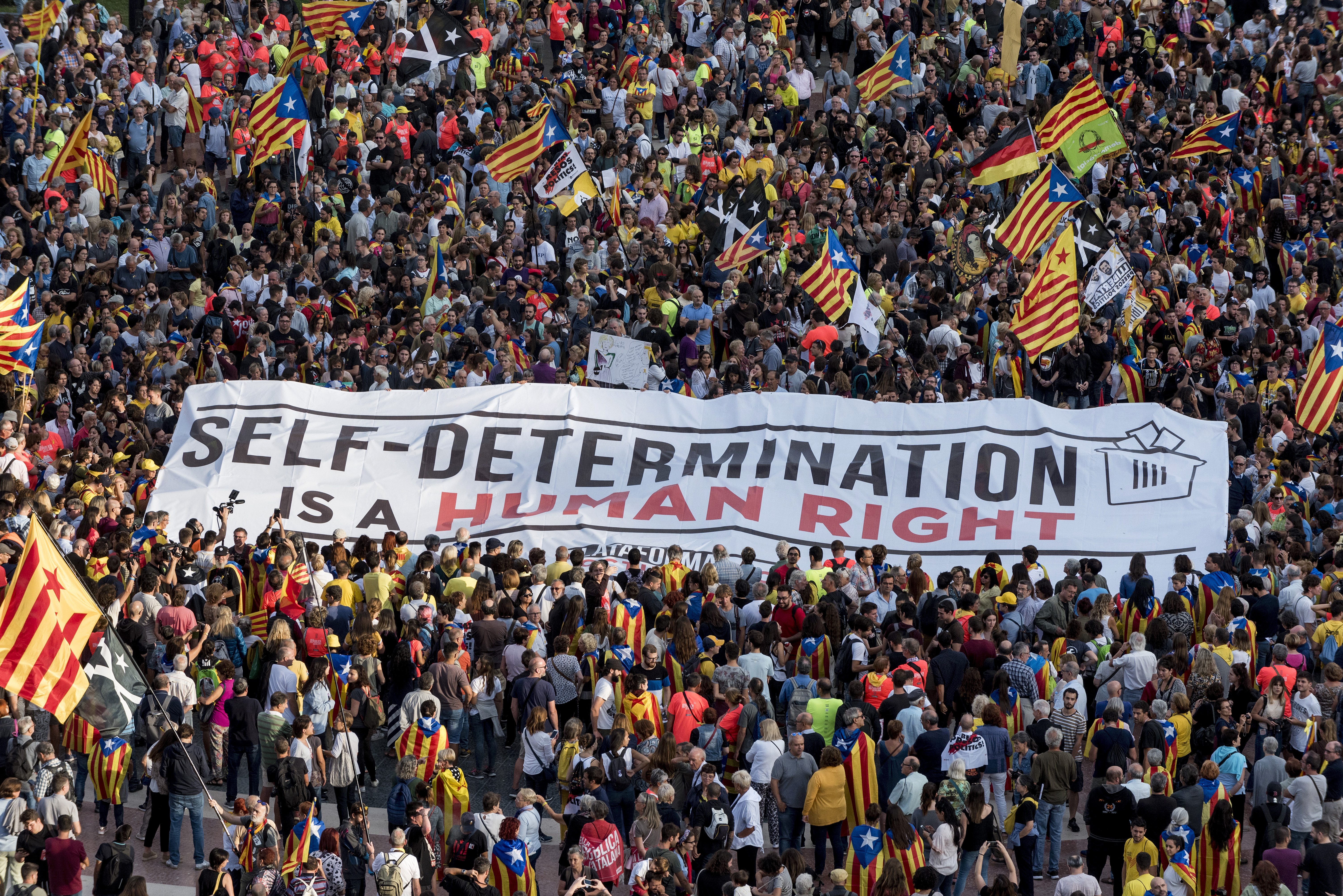 _DC89725